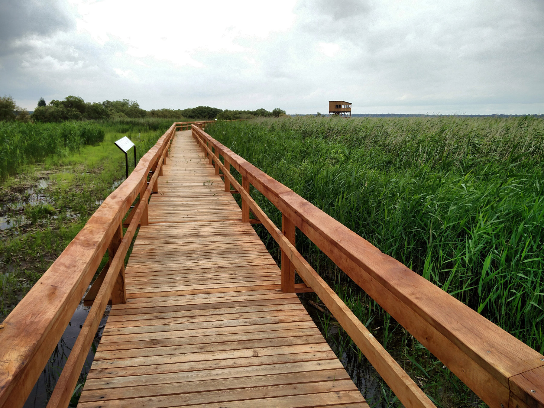 Žuvinto lankytojų centro pažintinis takas ir apžvalgos bokštelis.